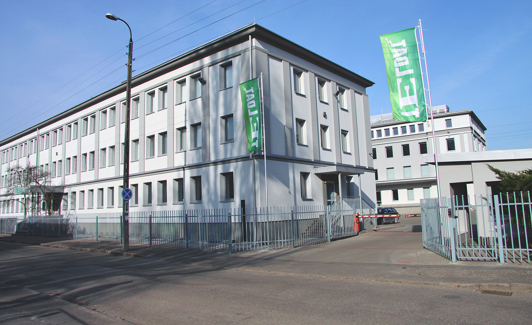 TELDAT w Bydgoszczy